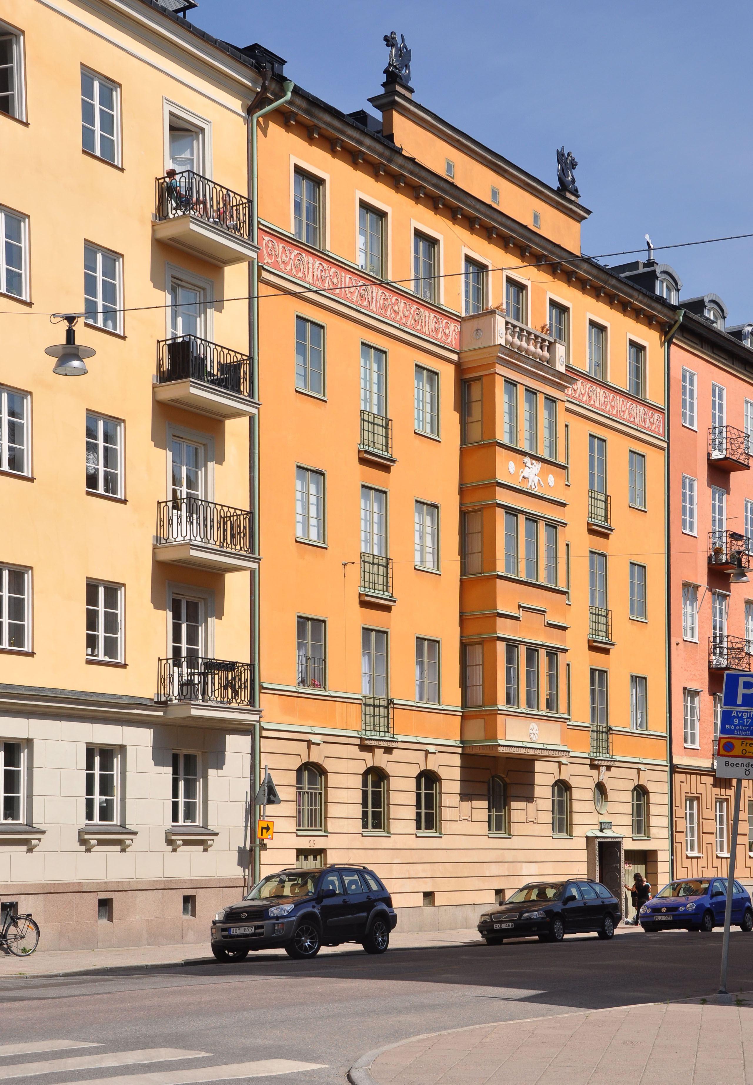 Östermalmsgatan 25, Stockholm Byggnadsår 1928, arkitekt K Nordenskjöld, byggherre och byggmästare Ahldin & Nordström.